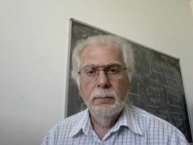 Foto di Roberto Casalbuoni